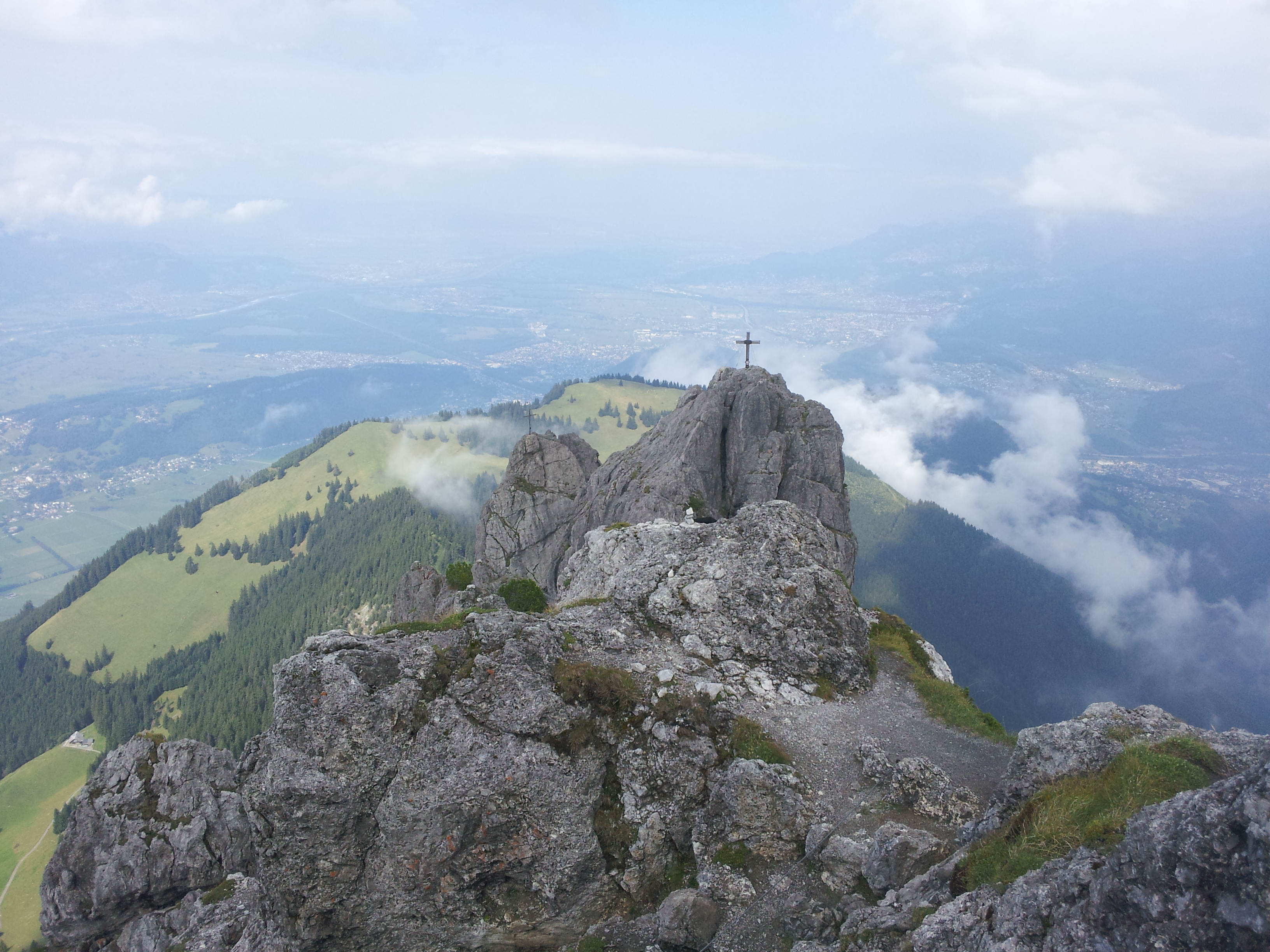 Blick von den Drei Schwestern in das Rheintal